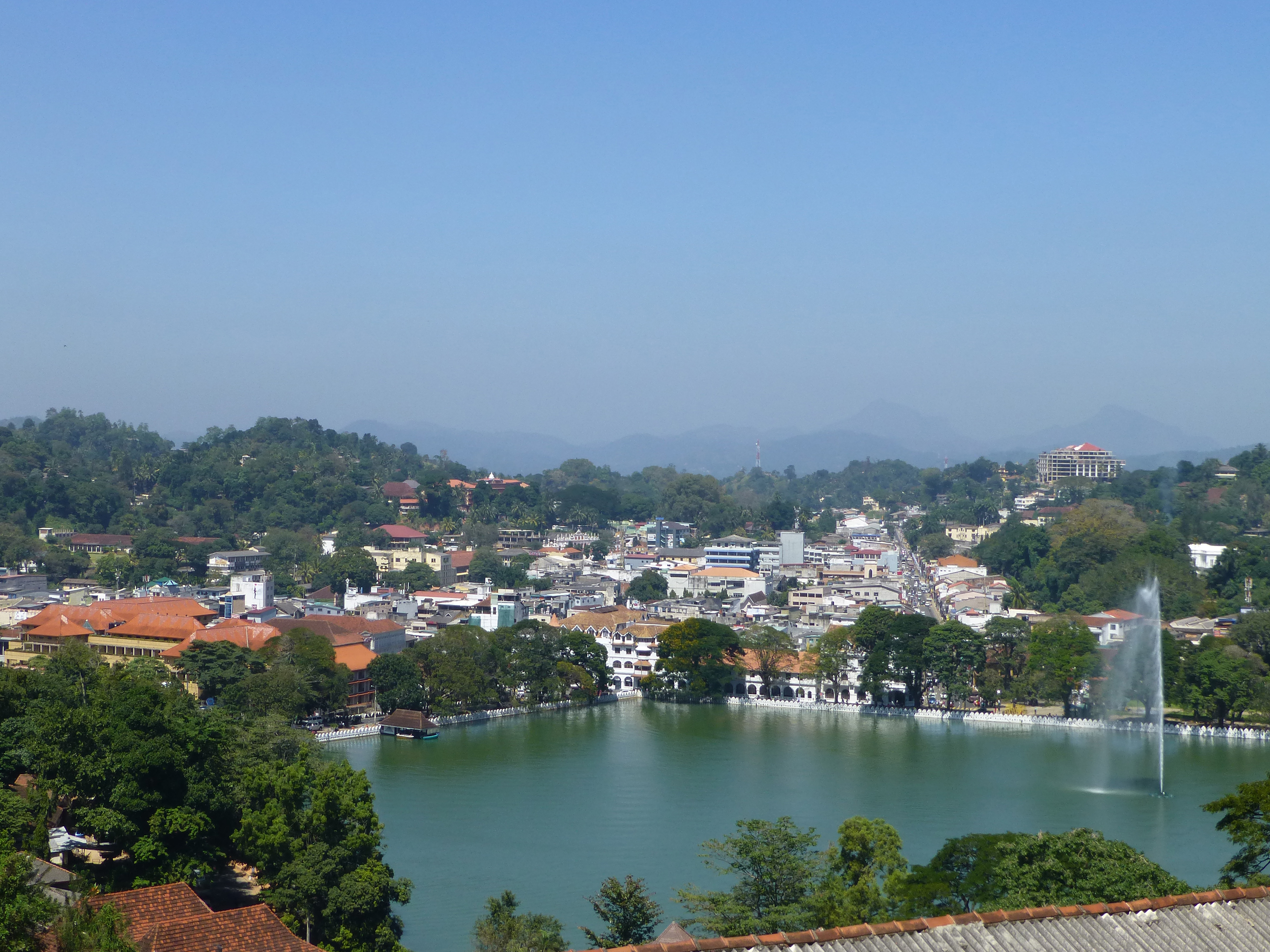 Lac de Kandy (Sri Lanka)